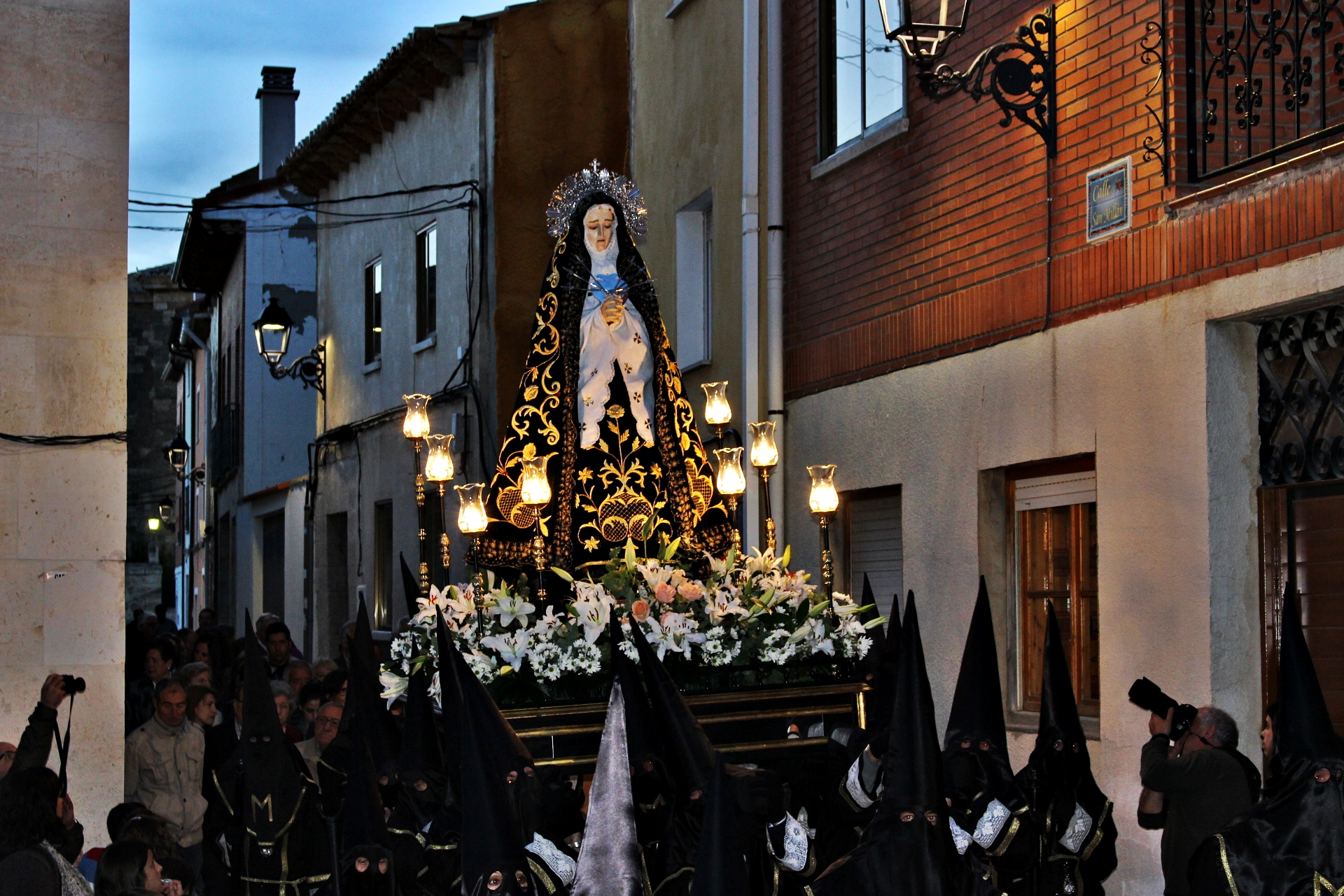 Semana Santa Baltanás